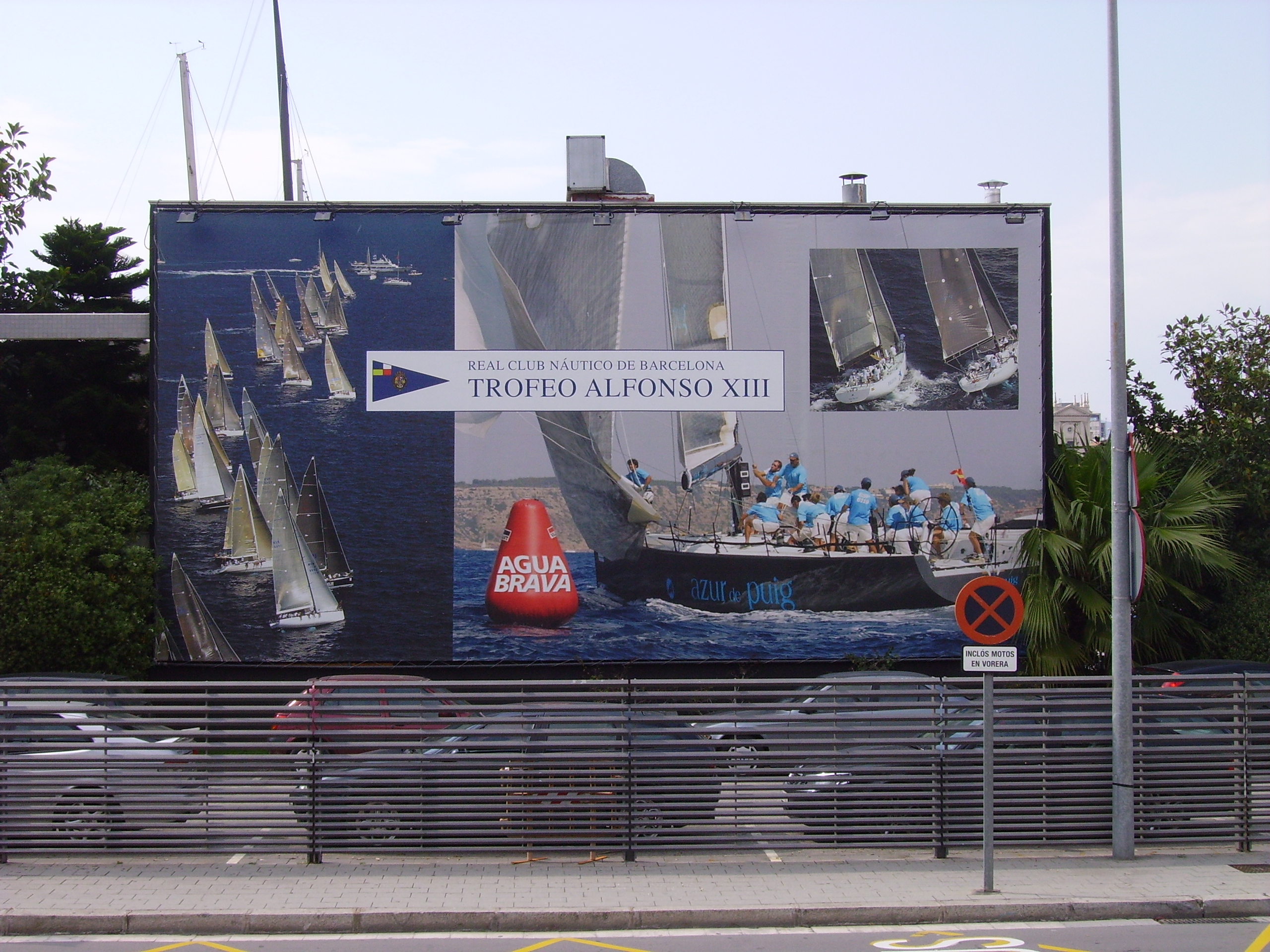 Anunci del Trofeu Alfonso XIII del Real Club Nàutic de Barcelona, Catalunya.